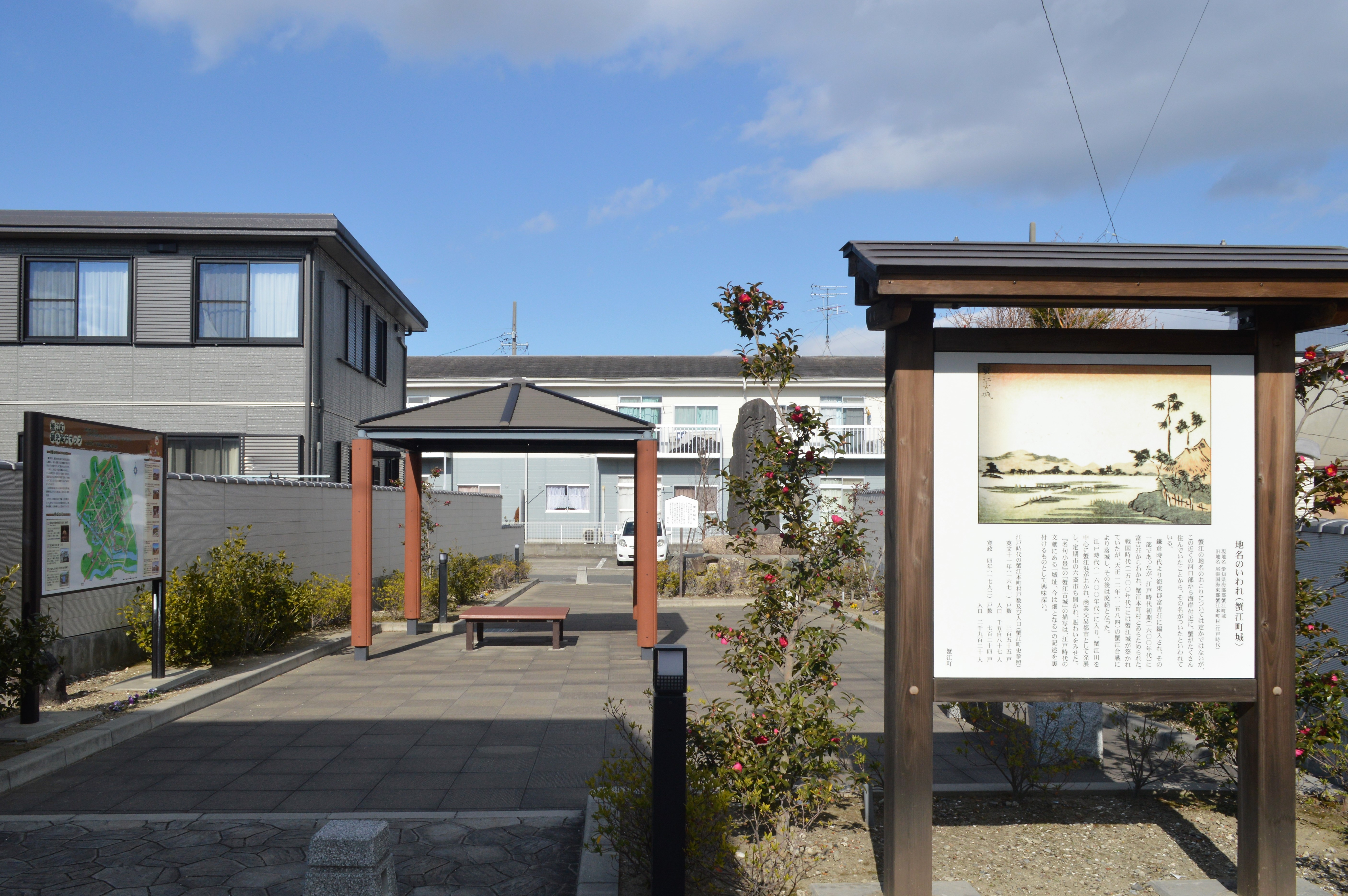 愛知県海部郡蟹江町にある蟹江城址公園。